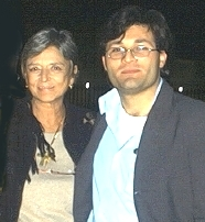 Jordan River with Liliana De Curtis, daughter of Toto (In Italy today he is widely considered to be one of the greatest Italian artist of spectacle, and the most respected Italian comedian and television personality of the last century)